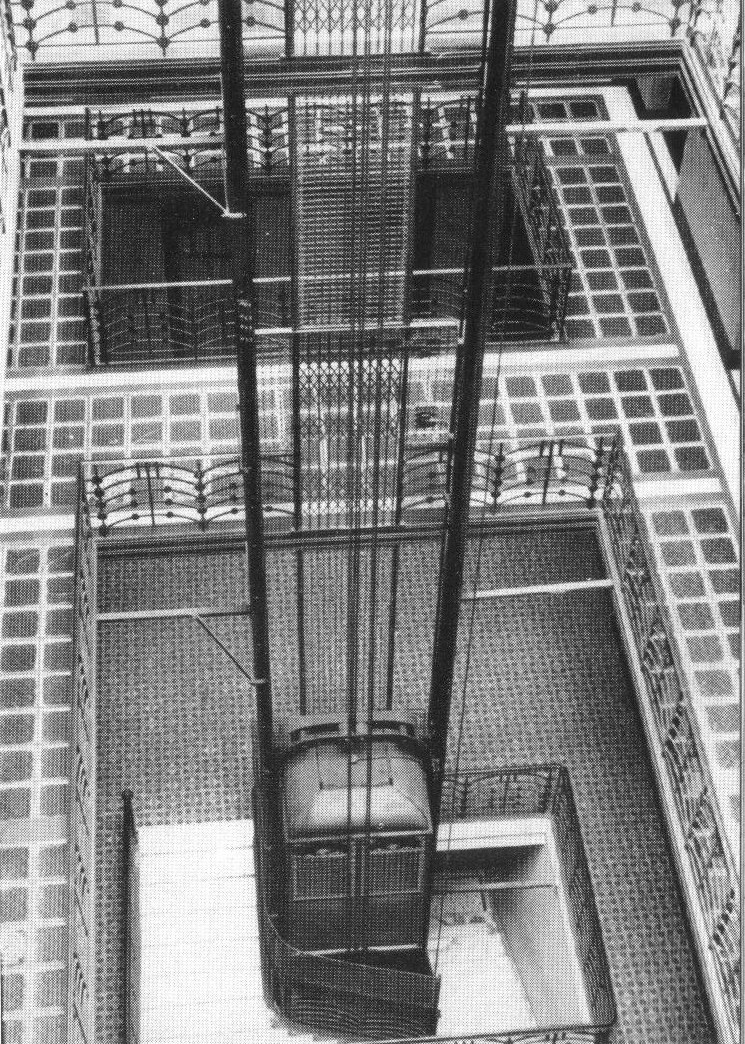 Hall y ascensor principal del edificio de oficinas en Chacabuco 78, Buenos Aires. Arquitecto Julián García Núñez, año 1910.